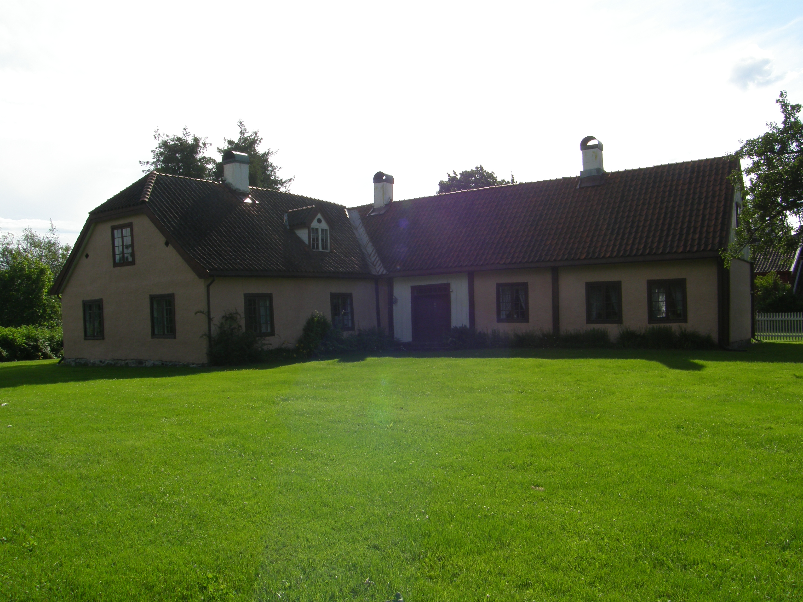 Riddergården, Hønefoss (våningshuset, øst)